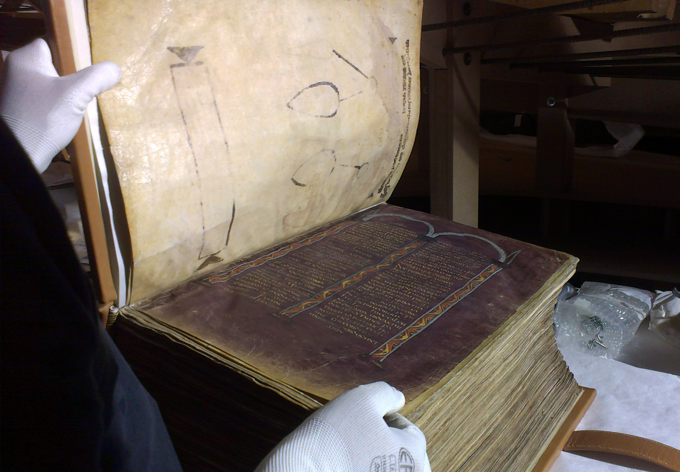 Codex Amiatinus